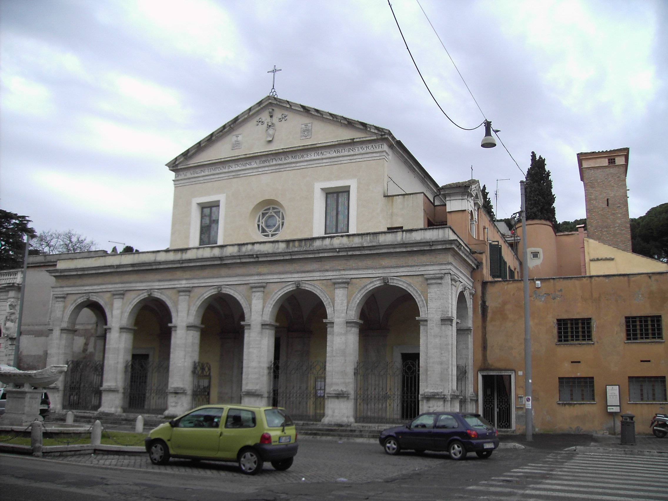 Roma, santa Maria in Domnica (detta anche santa Maria alla Navicella)